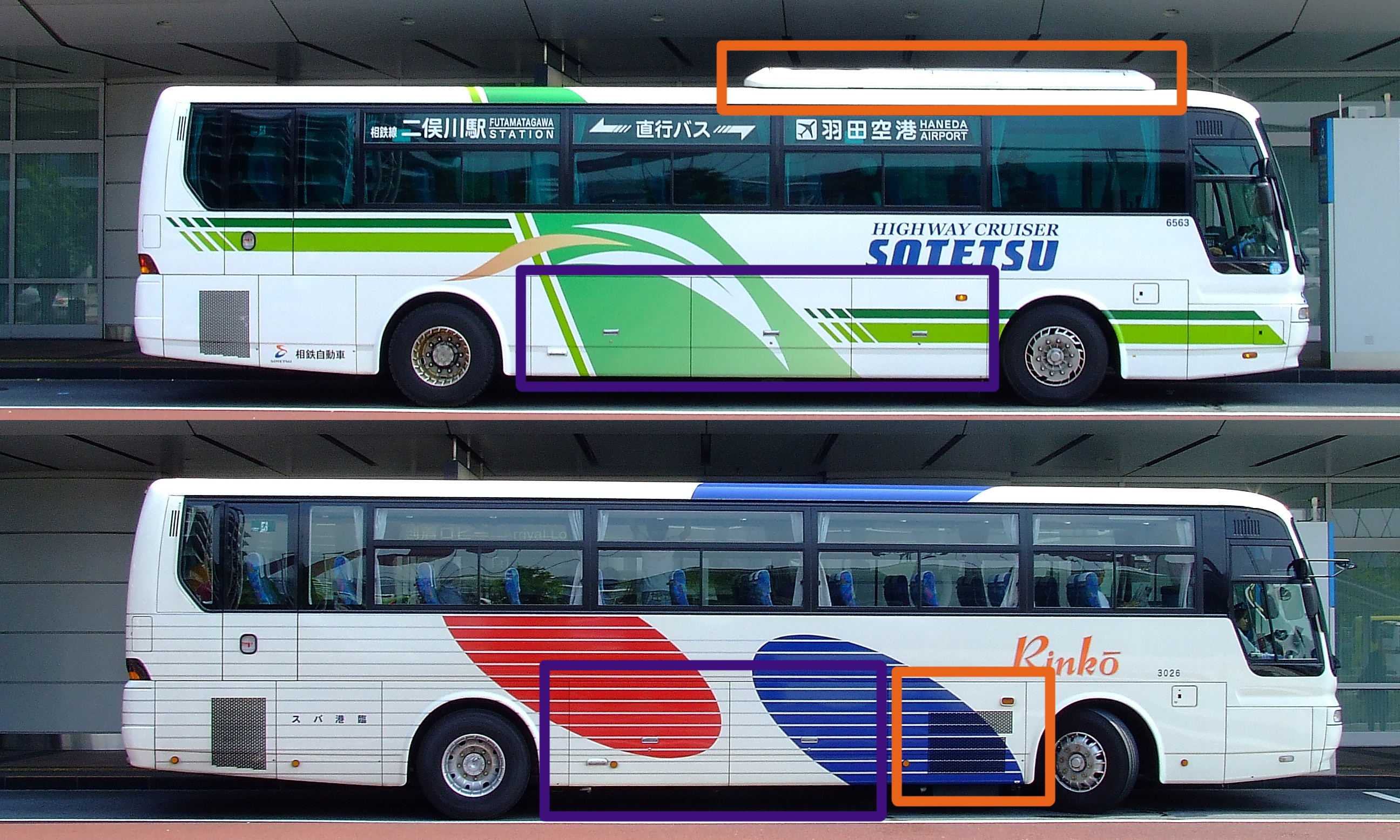 三菱ふそうトラック・バス製「エアロバス」における直結エアコン車（上）とサブエンジン式エアコン車（下）の違い。紫枠部分がトランクルーム、オレンジ枠部分がエアコン搭載部。写真は相鉄自動車所属車（上）と川崎鶴見臨港バス所属車（下）、ともに東京国際空港（羽田空港）にて。